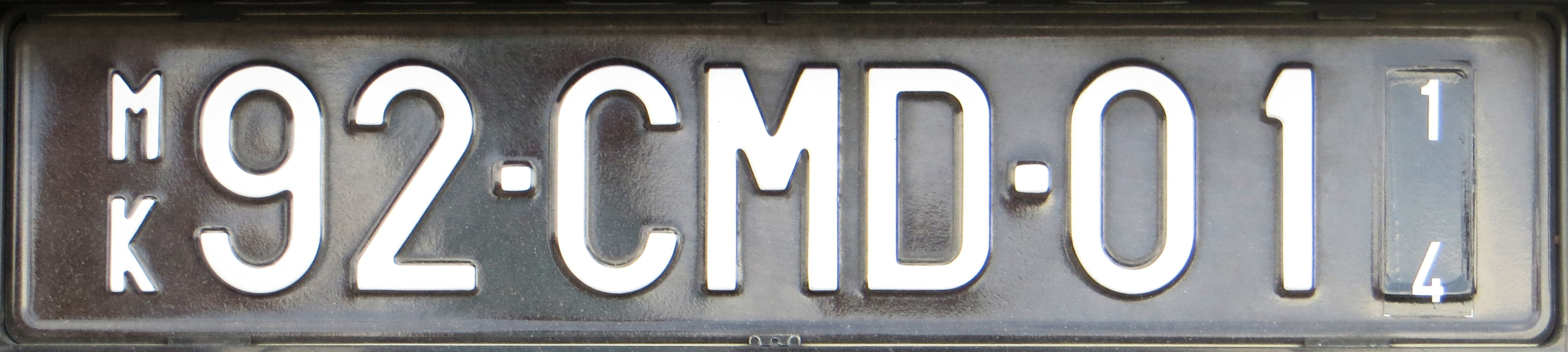 CD kenteken Macedonië